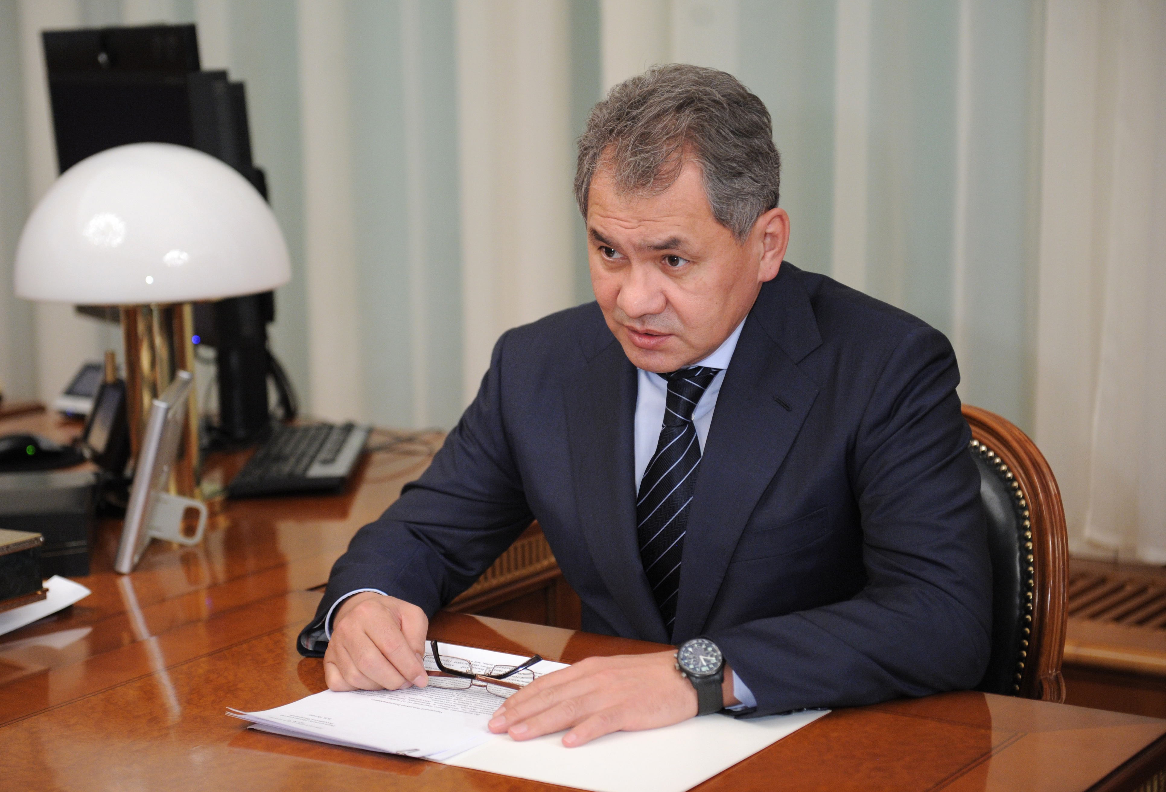 Министр Российской Федерации по делам гражданской обороны, чрезвычайным ситуациям и ликвидации последствий стихийных бедствий С. К. Шойгу на встрече с Председателем Правительства Российской Федерации В. В. Путиным